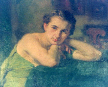 Stefania Kulkowa, 1940 olej, płótno, 59 x 70 cm